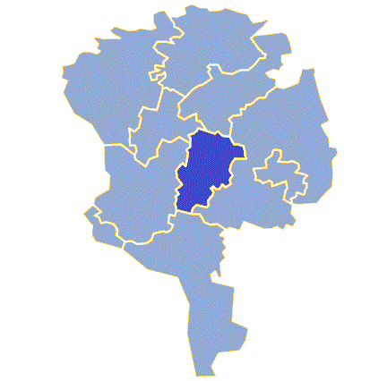 Powiat żarski - Gmina Lipinki Łużyckie